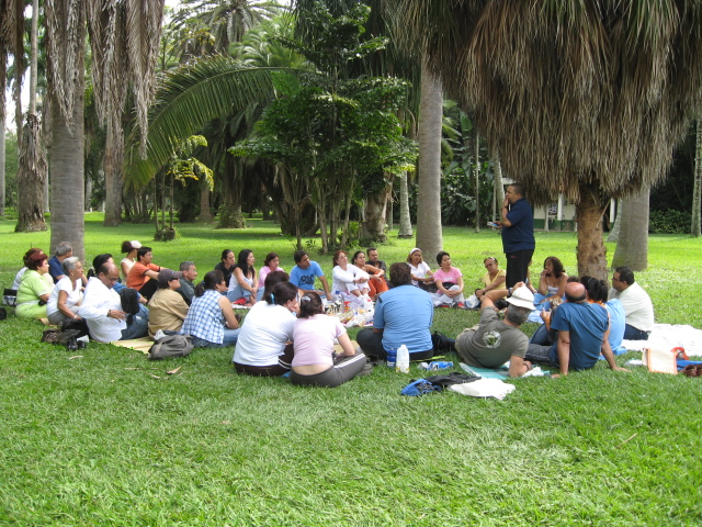 Encuentro Reki con Dunas